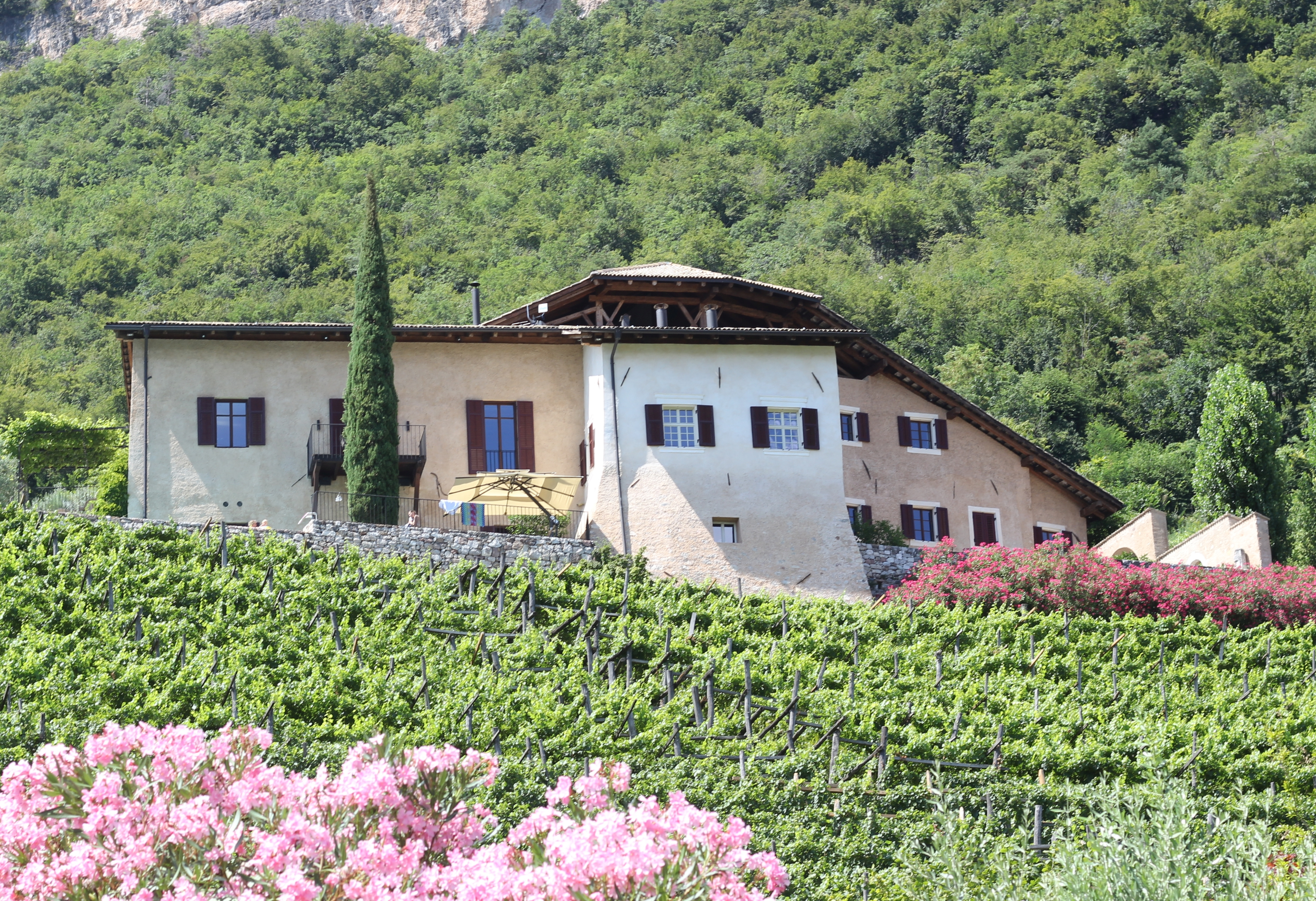 Eberle in Kurtatsch